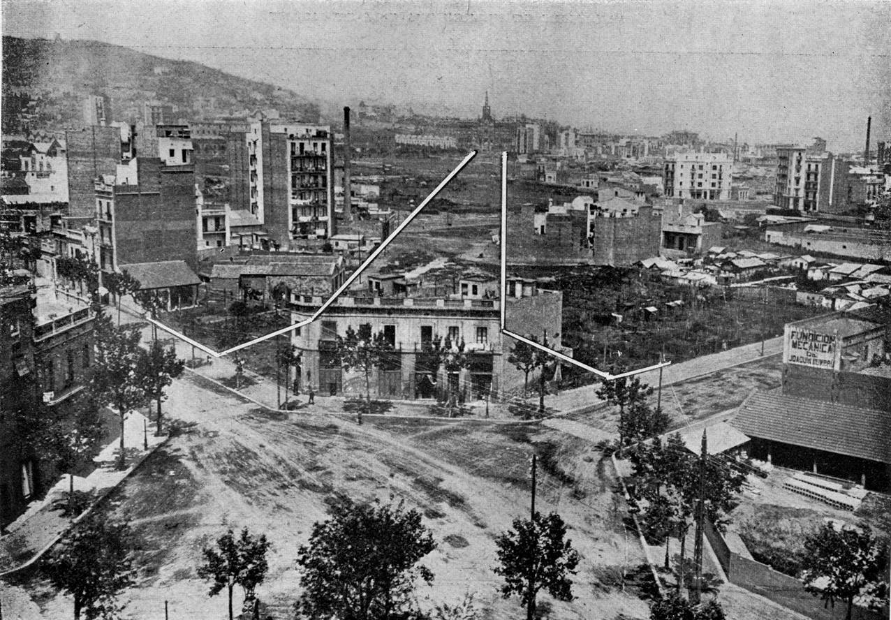 Propuesta de apertura de la Avenida Gaudí de Barcelona a partir del Plan de Enlaces de 1917 y de los trazados propuestos por Léon Jaussely en 1904.